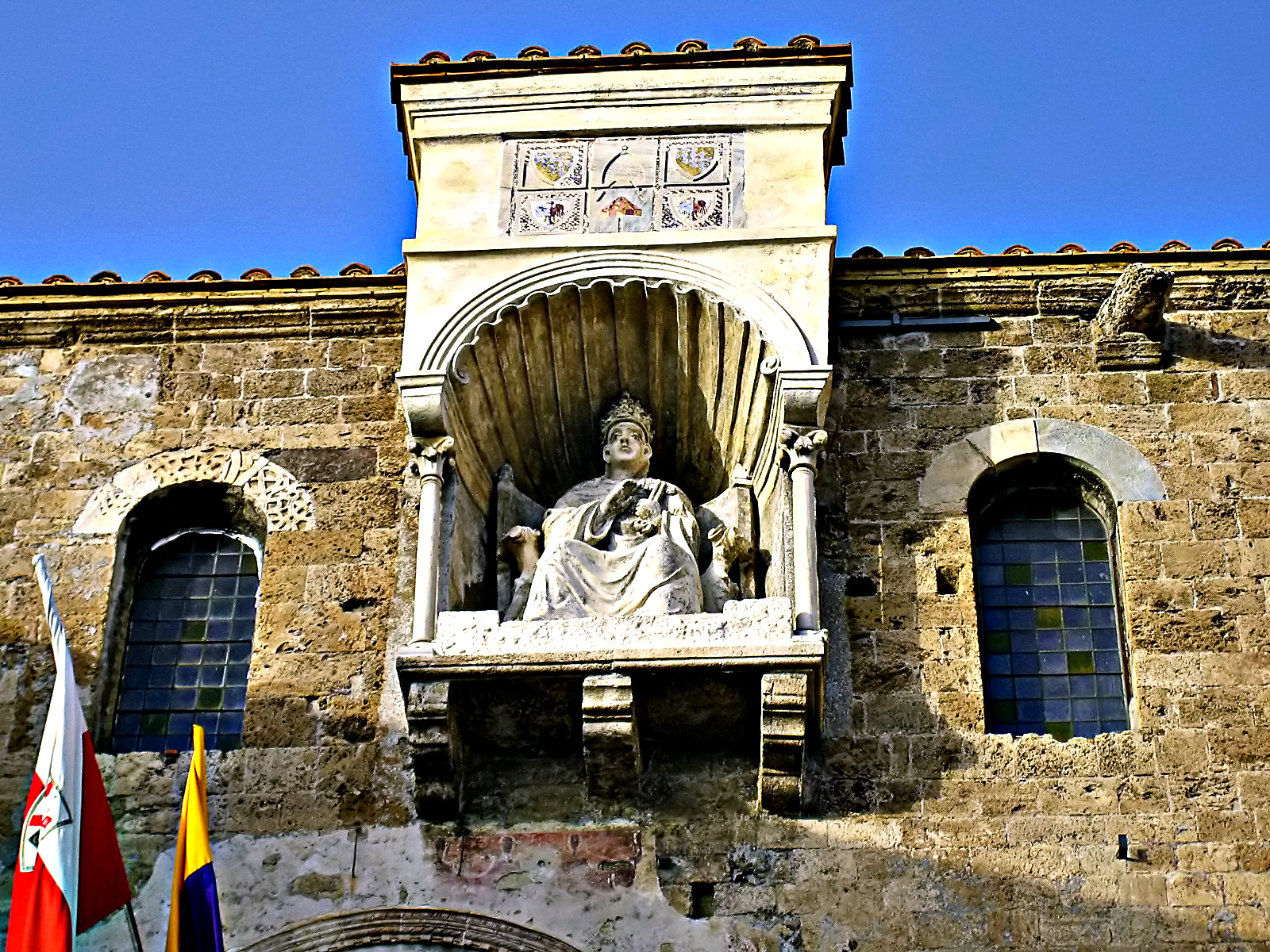 Particolare della cattedrale di Anagni con statua di papa Bonifacio VIII.